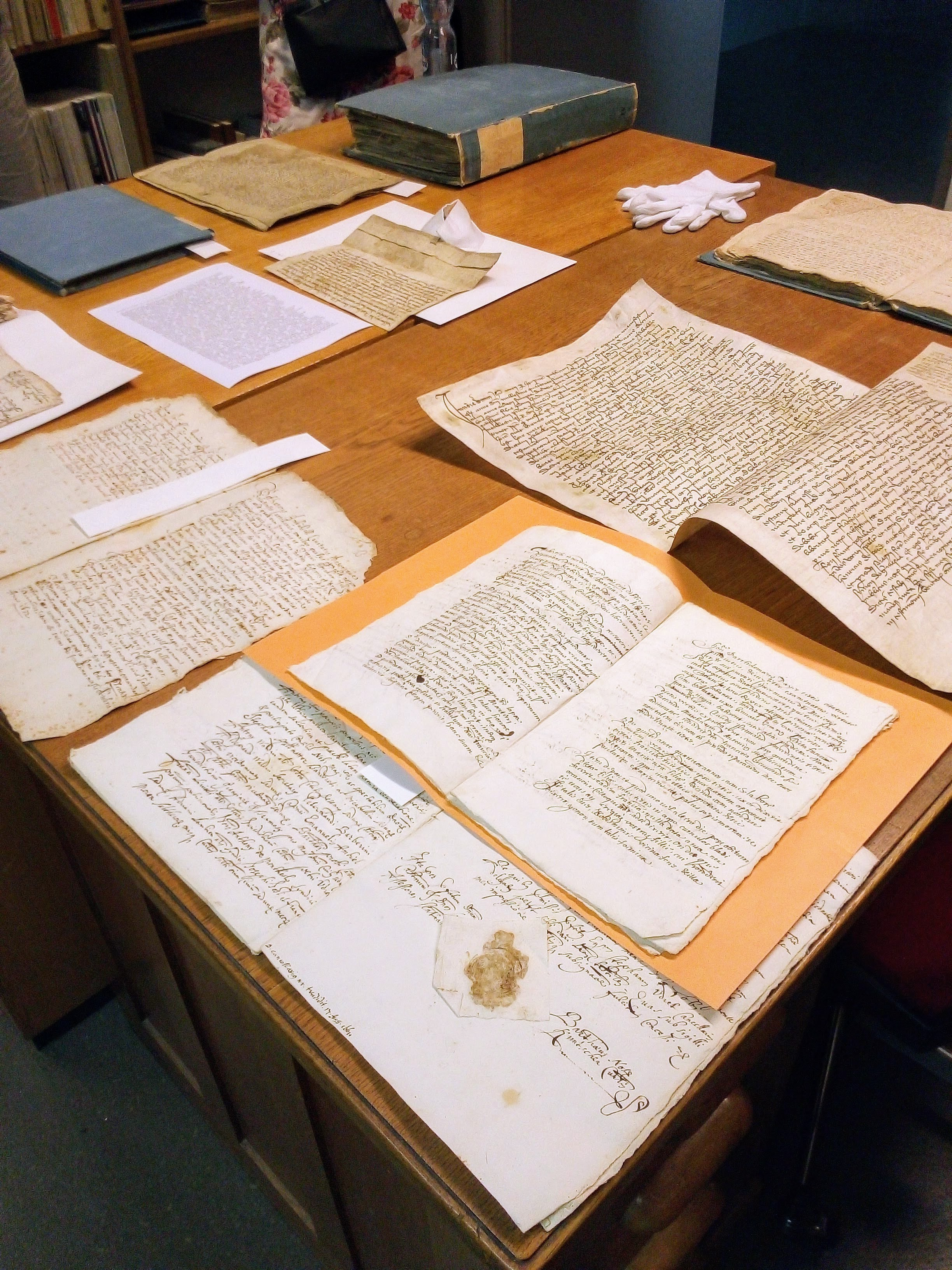 Extraits d'archives judiciaires et notariales concernant des procès en sorcellerie à Sion (Suisse)